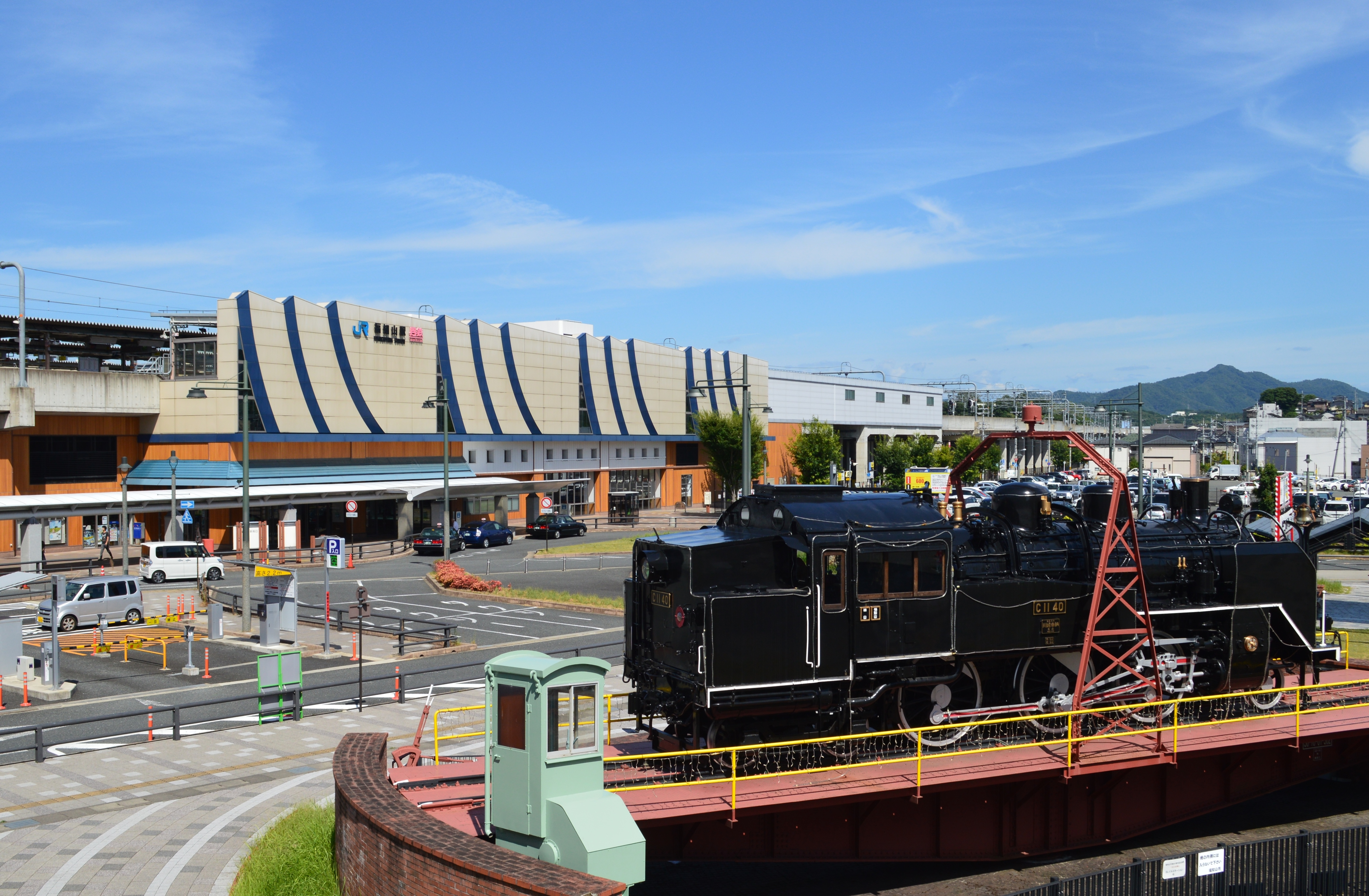 福知山駅 南口